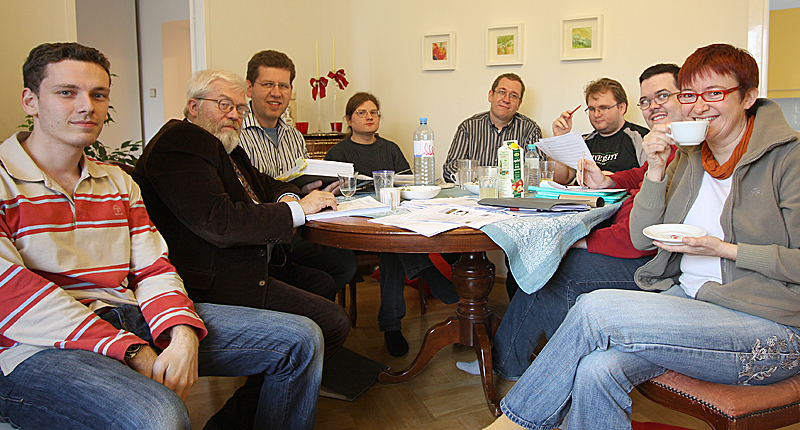 Mitglieder der Schreibwettbewerbsjury 2008/2 bei der Jurysitzung in Wien